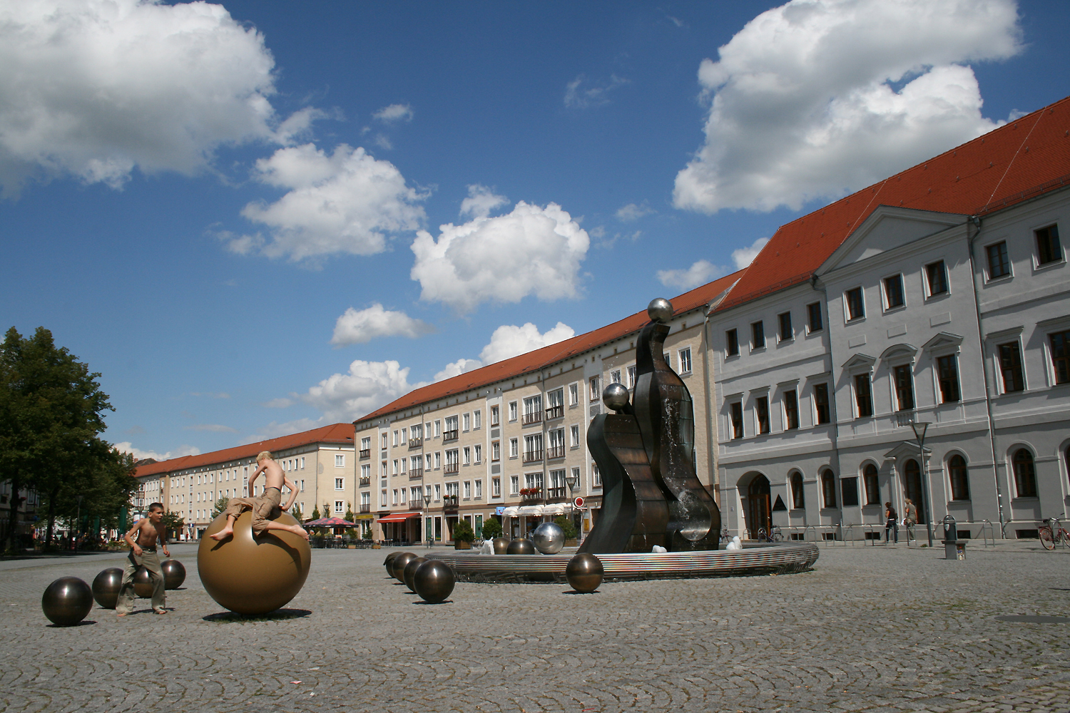 Marktplatz in Dessau / marketplace of Dessau